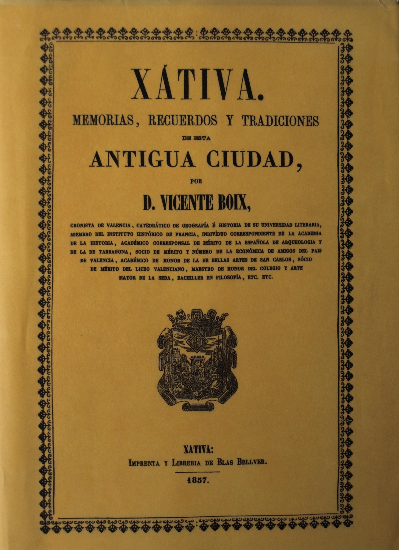 Foto de la portada del llibre "Xátiva" de Vicent Boix